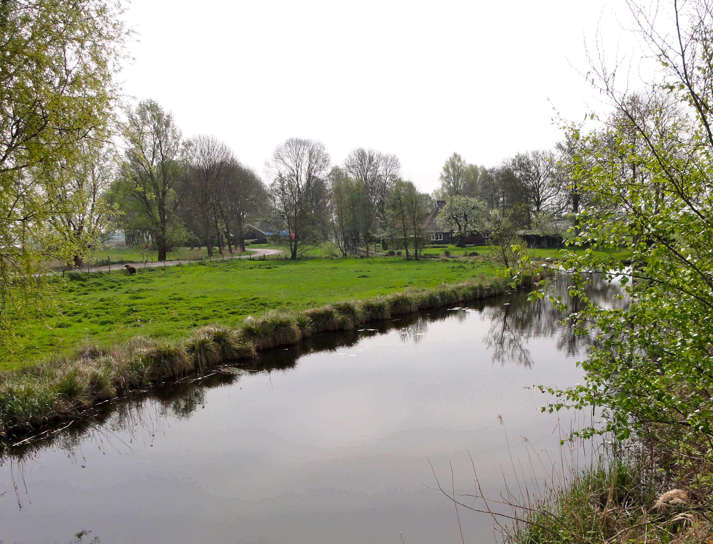 De buurtschap Nederland in de Weerribben